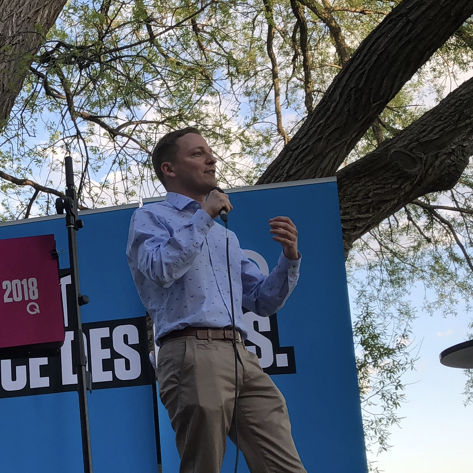 Mathieu Traversy à son investiture 2018